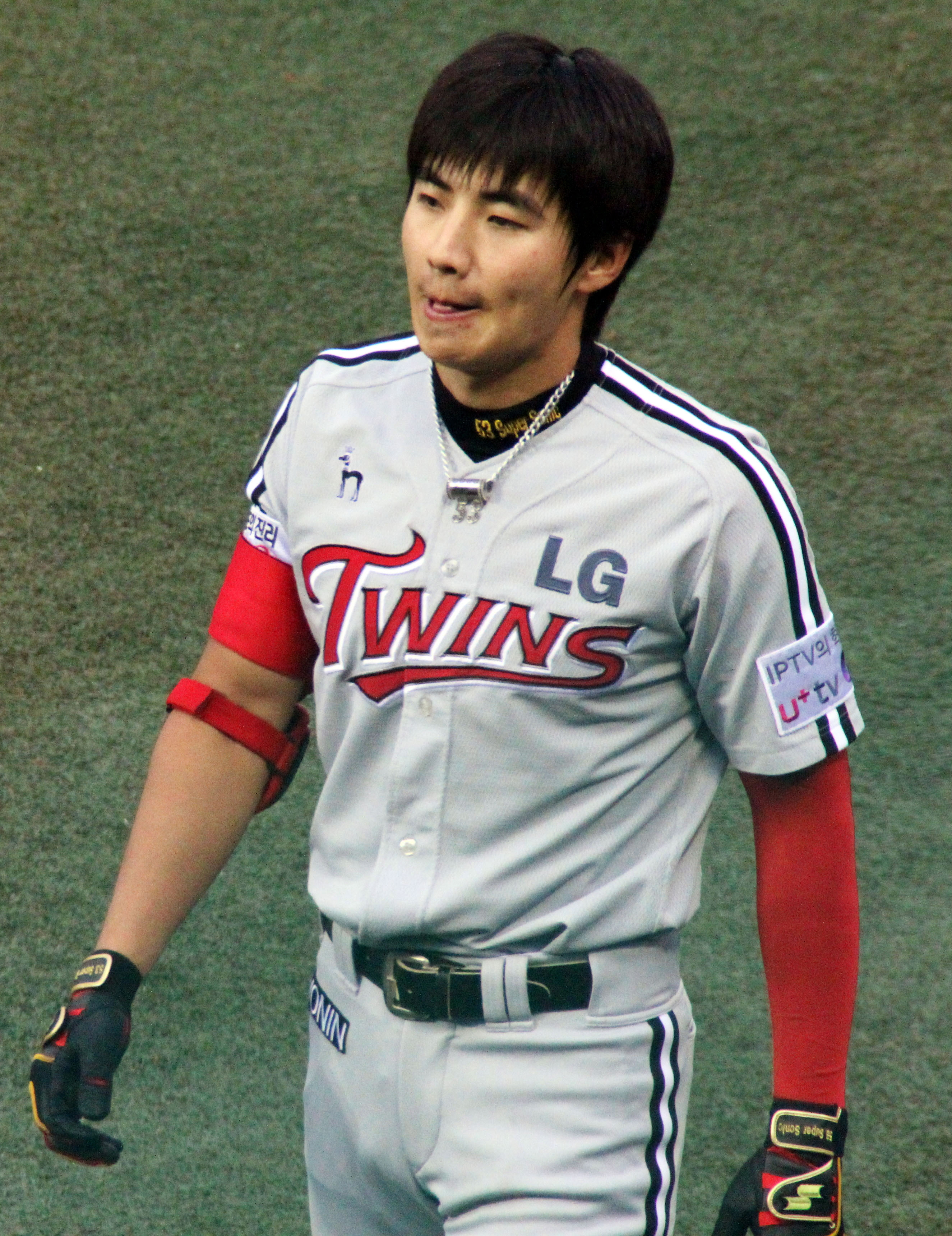 130707 목동구장